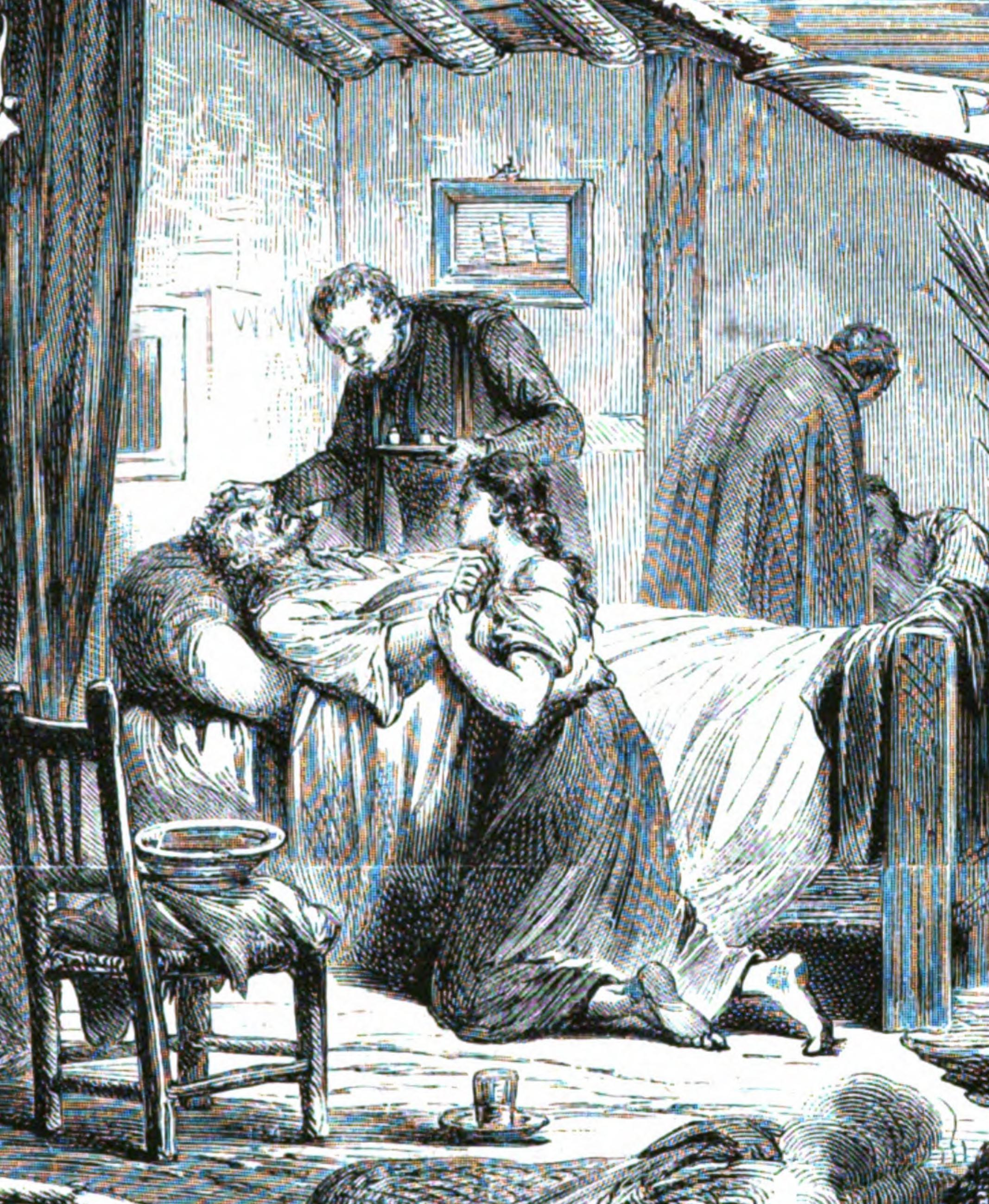 España.—Campamento en las afueras de Barcelona con motivo de la fiebre amarilla.